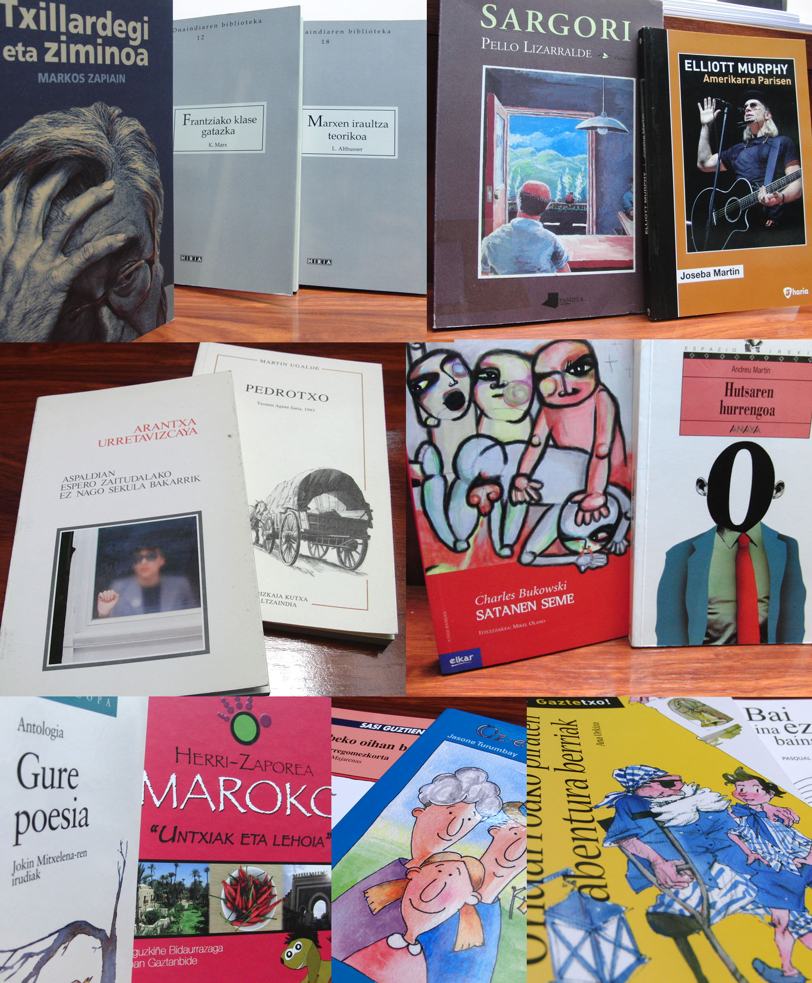 Euskal liburu bat baino gehiago da.